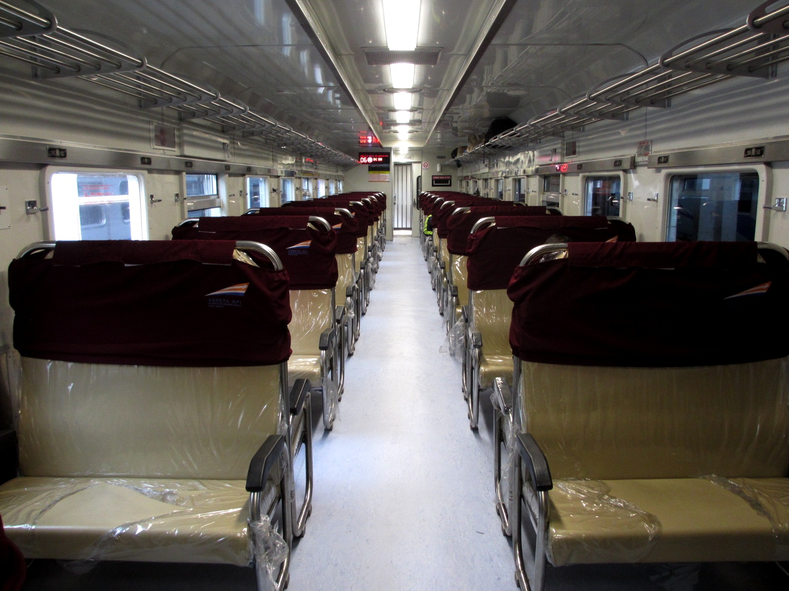 Interior KA Jayabaya.